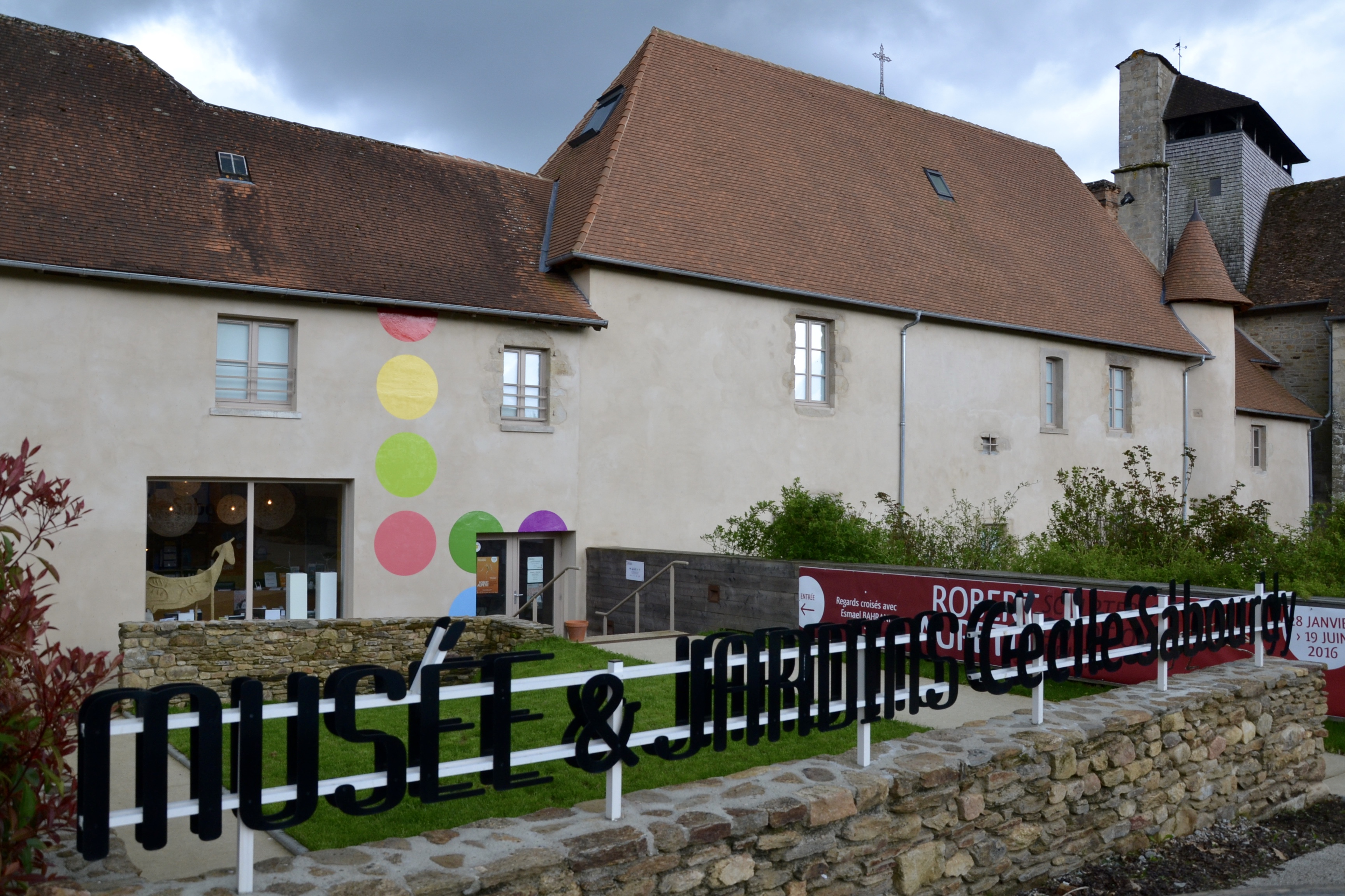 Entrée du musée et des jardins Cécile Sabourdy à Vicq-sur-Breuilh (Haute-Vienne, France).